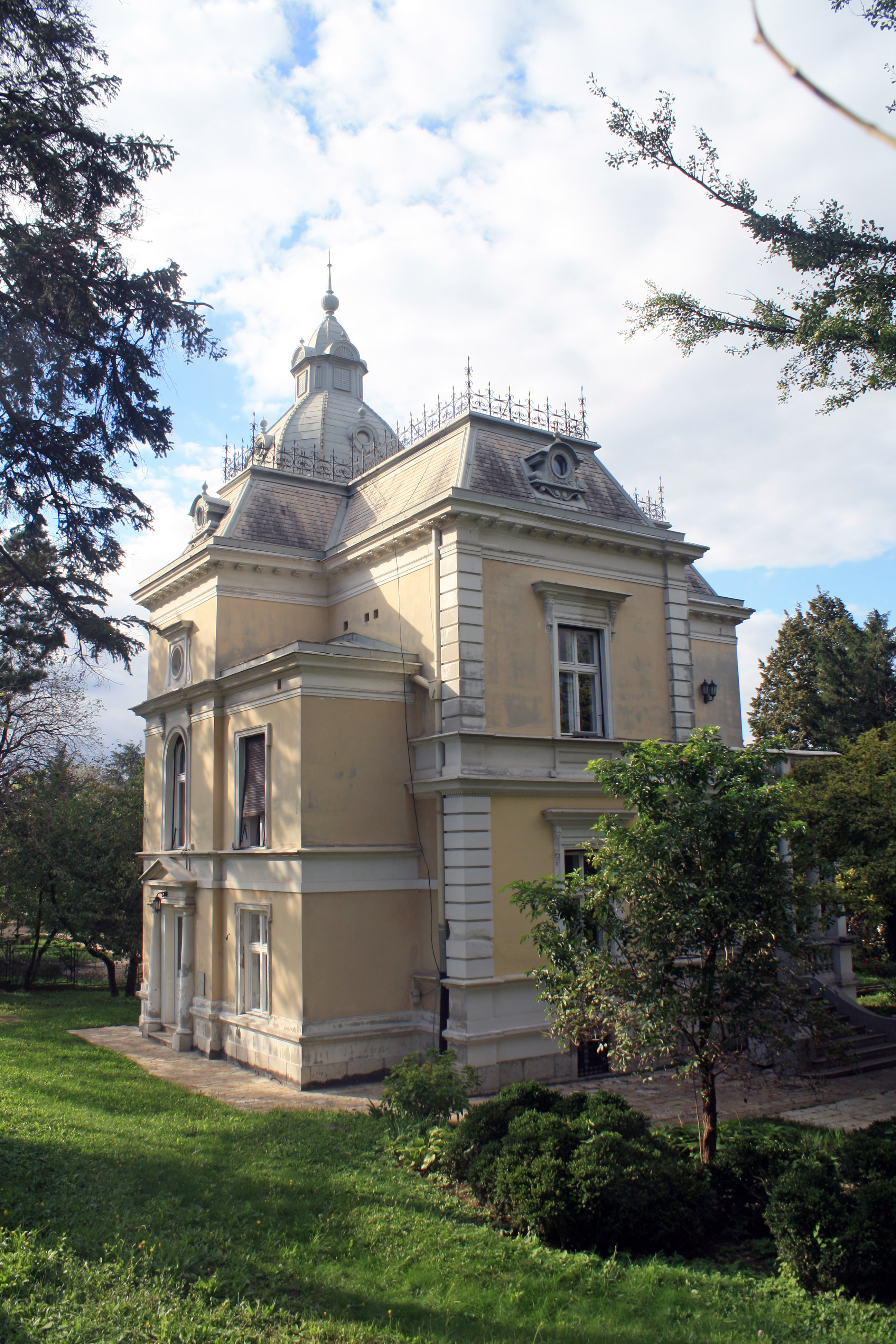 Кућа краља Петра I Карађорђевића